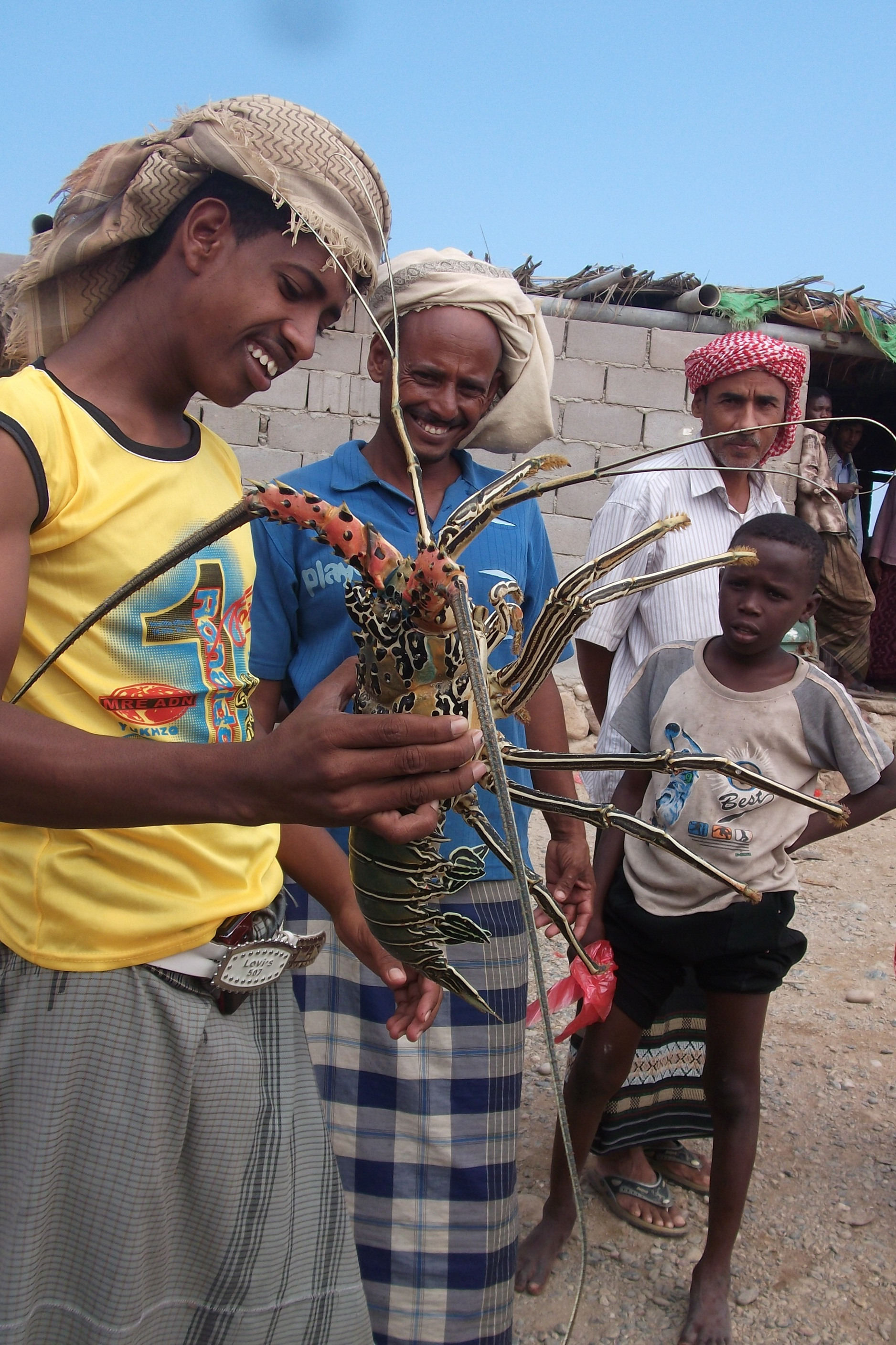 Man holding spiny lobster, Yemen.